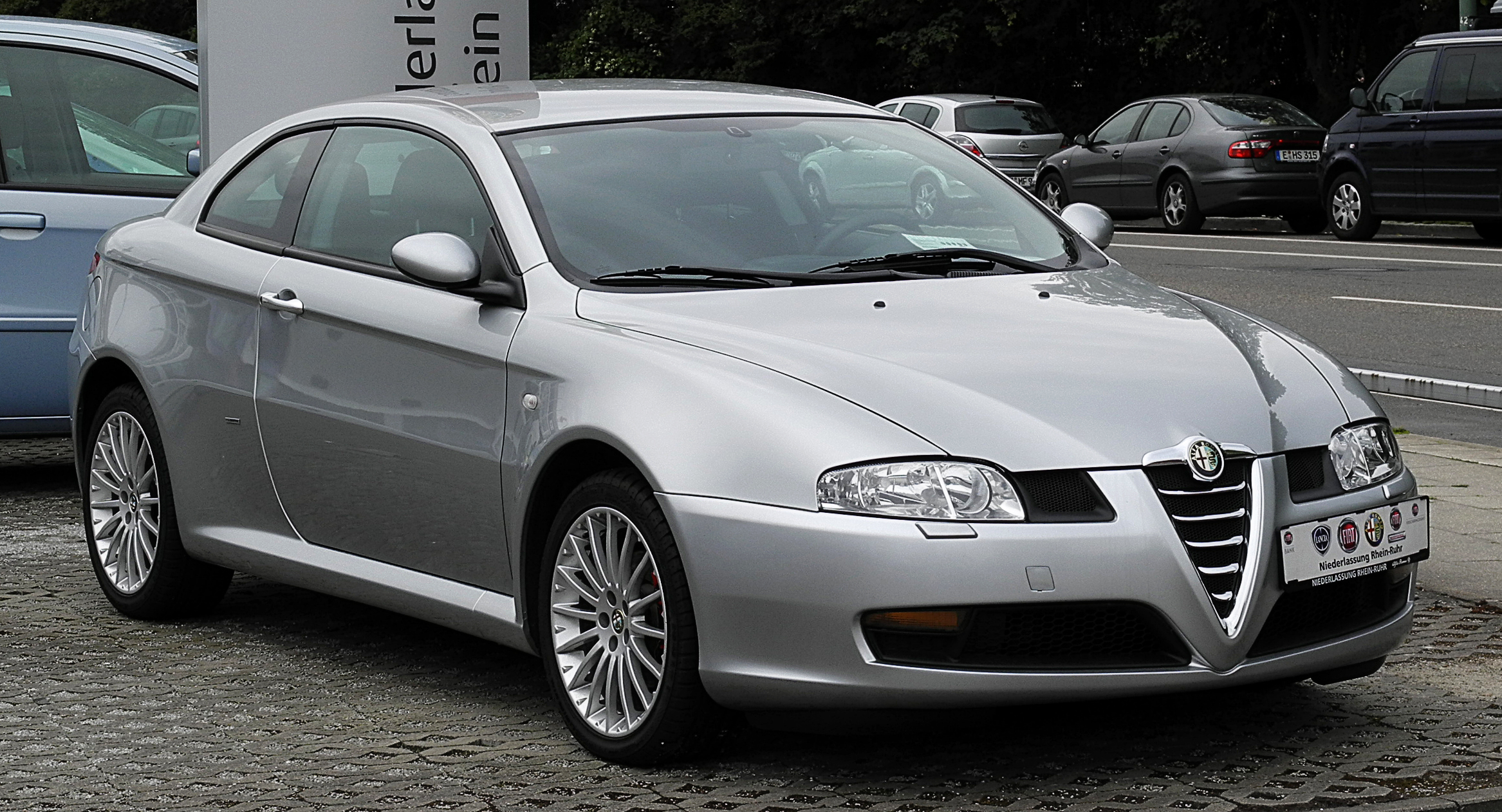 Alfa Romeo GT 1.8 TS 16V Progression